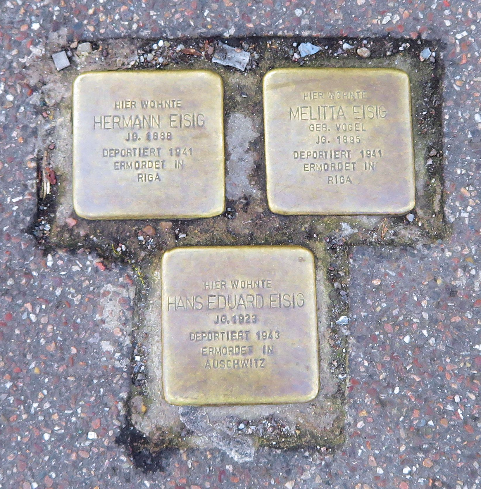 Stolpersteine für Familie Eisig in Heilbronn, Moltkestraße